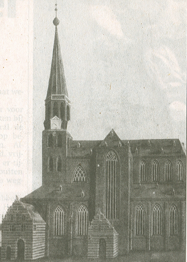 De Groningse Der Aa kerk in de 18e eeuw. Contemporaine tekening